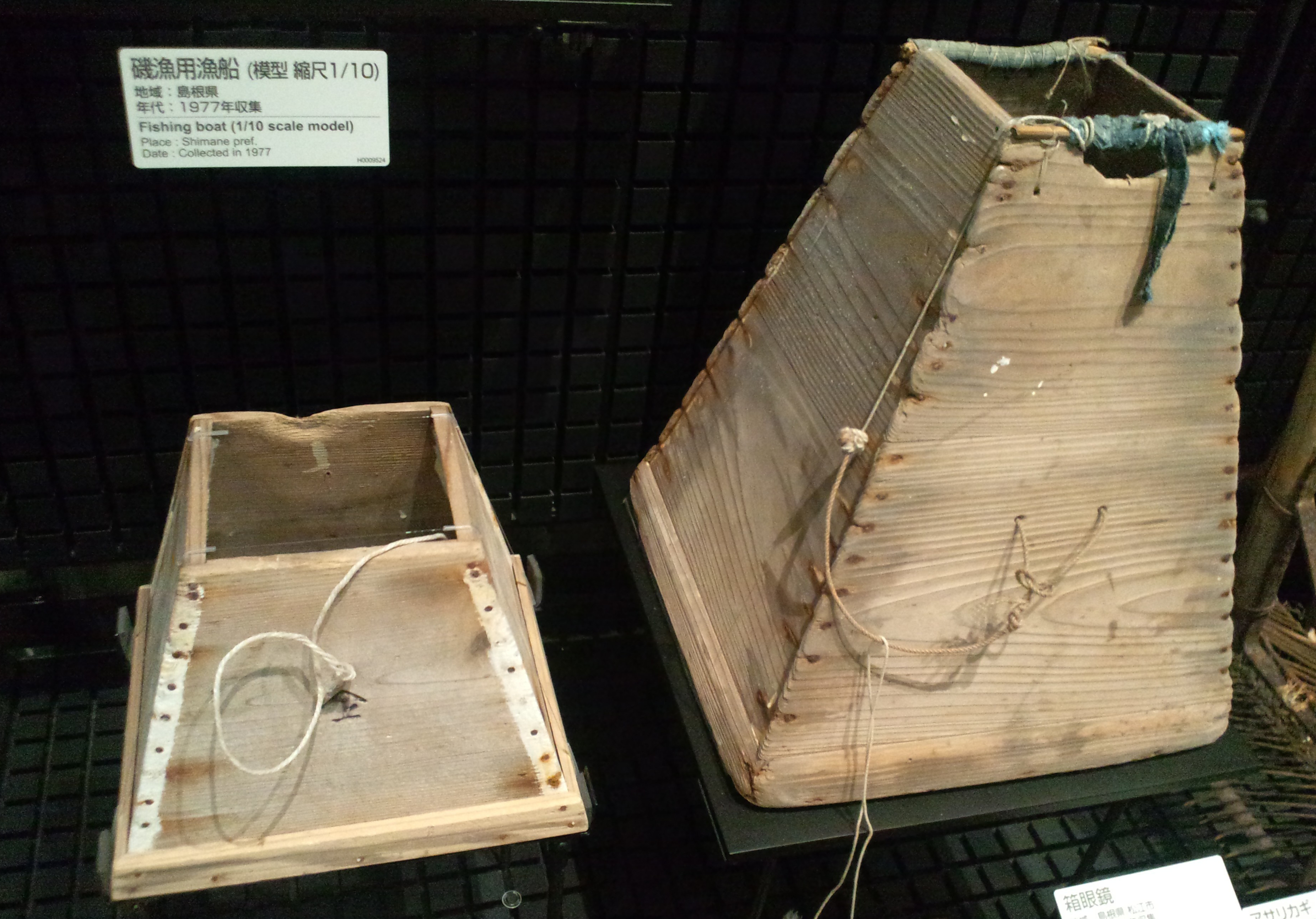 国立民族学博物館（大阪） 箱眼鏡（島根県、松江市、1976年収集）